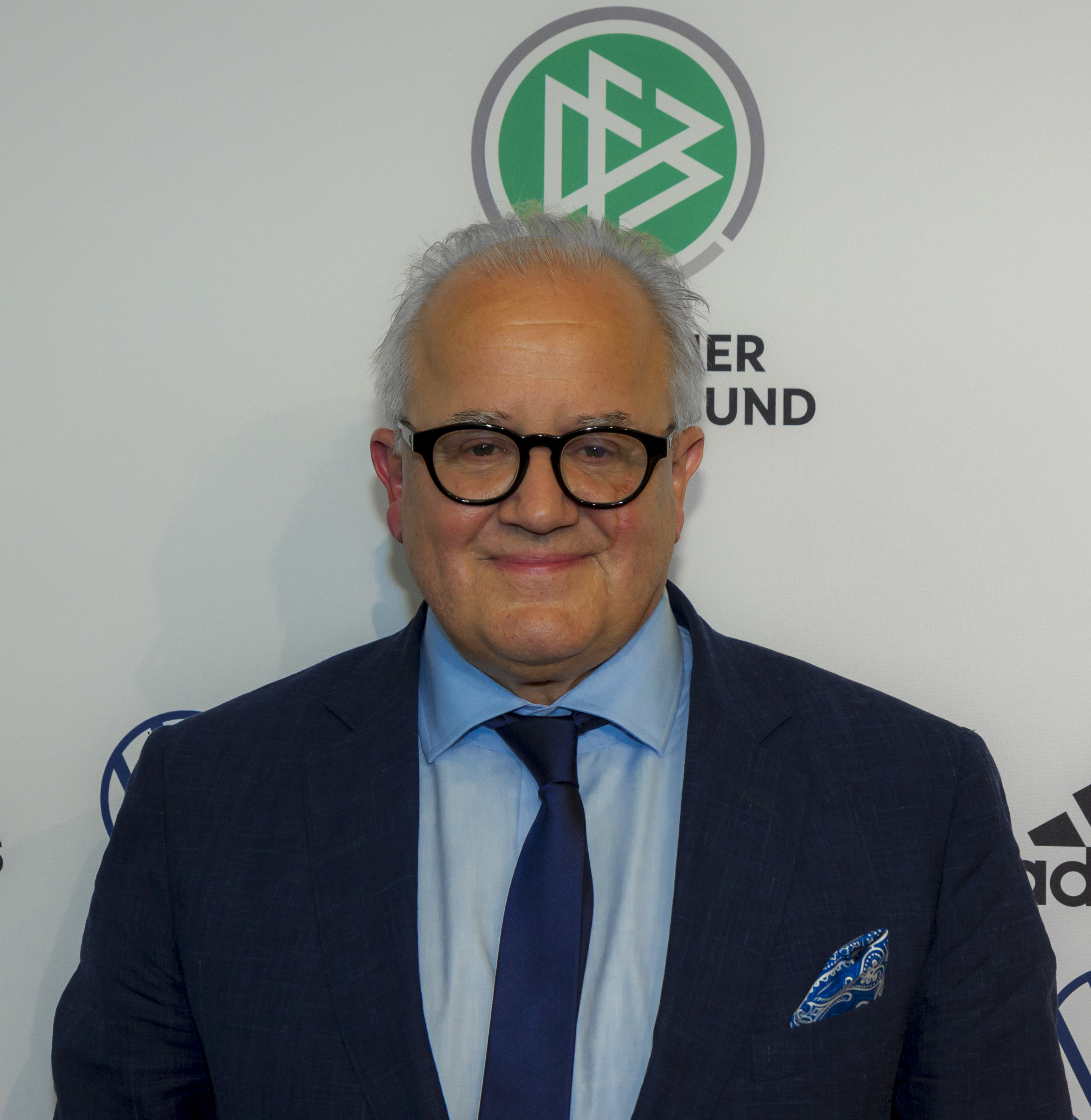 DFB-Präsident Fritz Keller am 27. September 2019 beim DFB Bundestag in Frankfurt am Main.